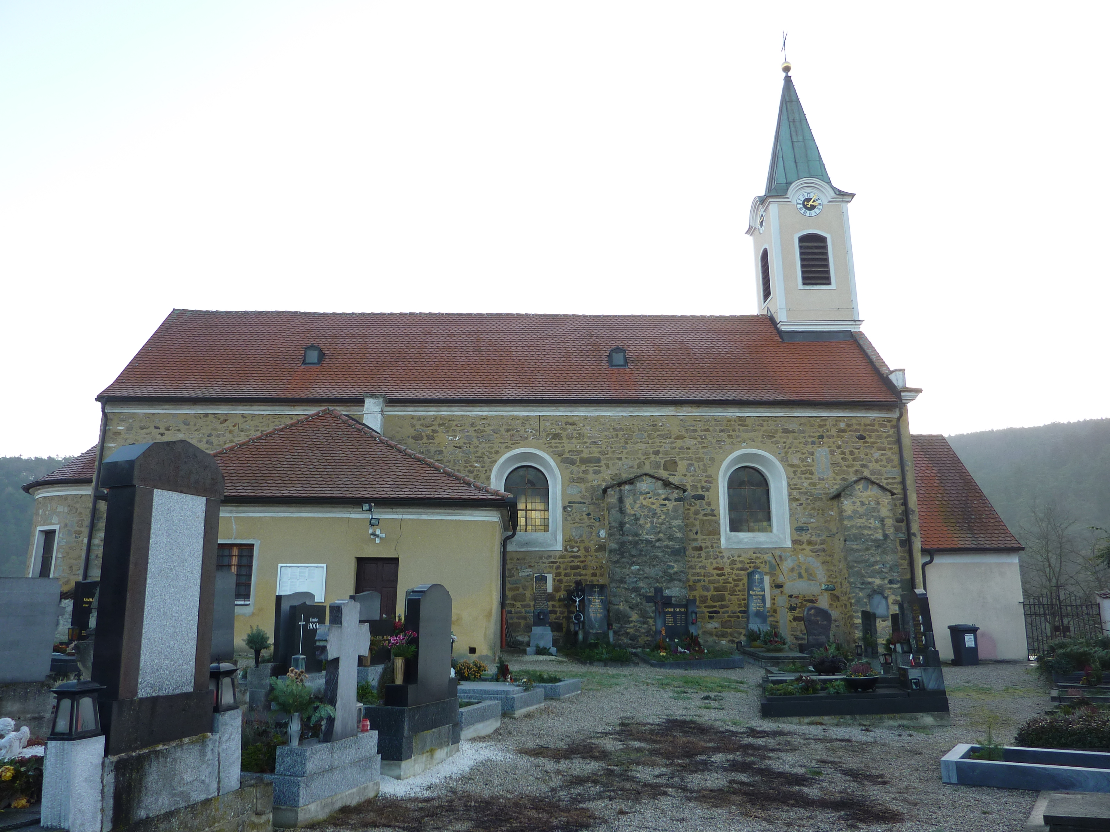 Filialkirche hl. Margarete, Elsarn, Straß im Straßertale, Niederösterreich